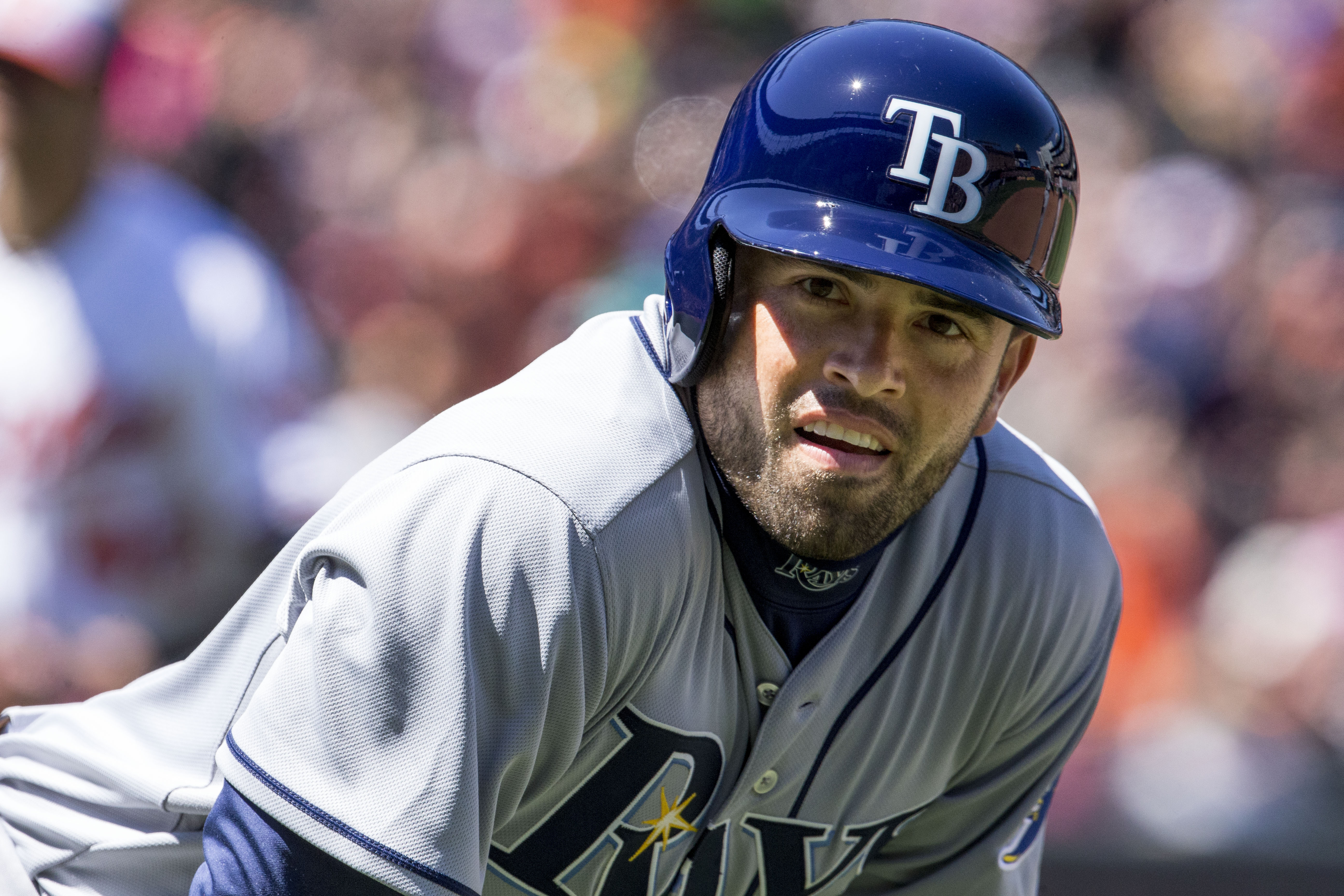 David DeJesus